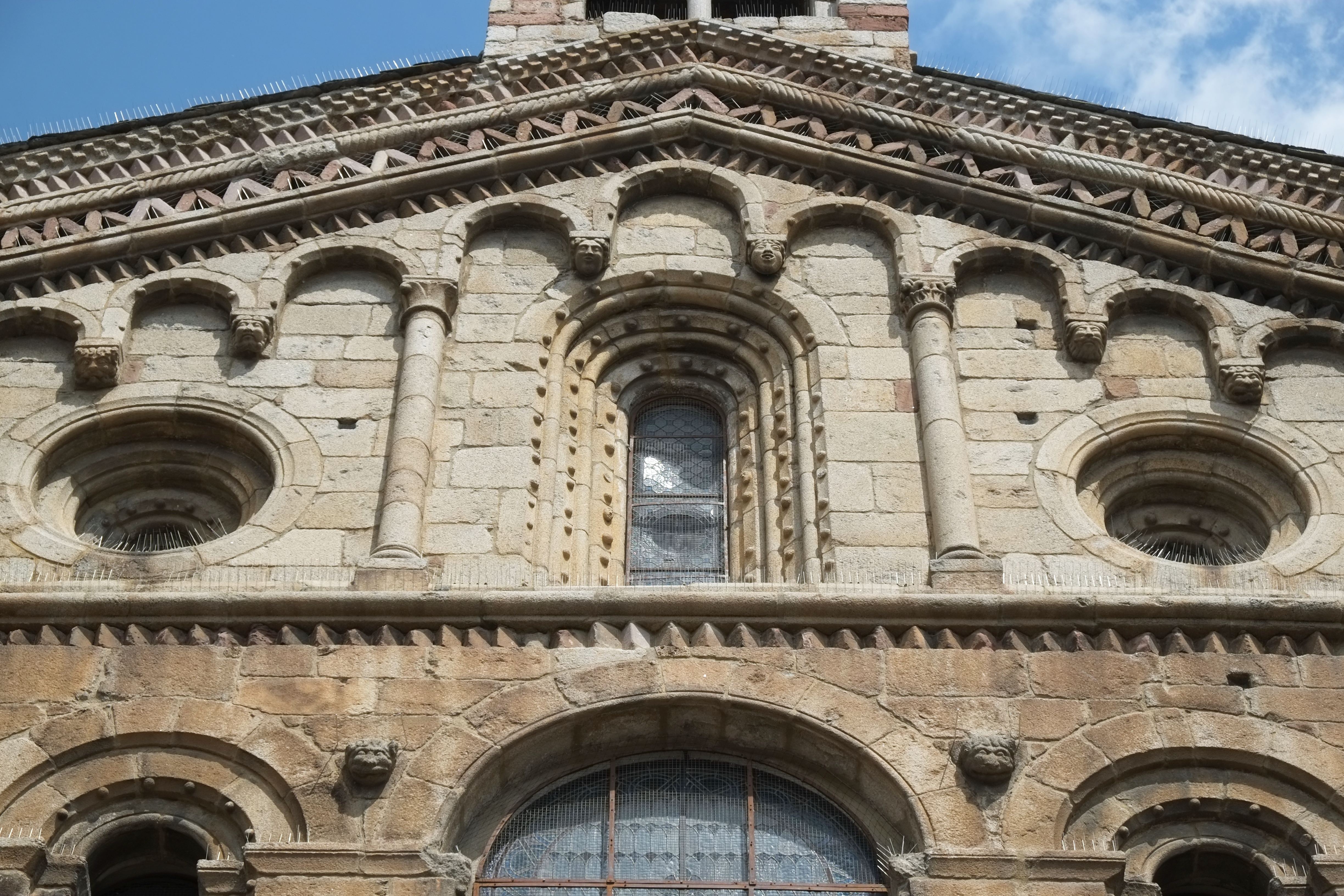 Bleiglasfenster in der Kathedrale in La Seu d’Urgell in Katalonien (Spanien)